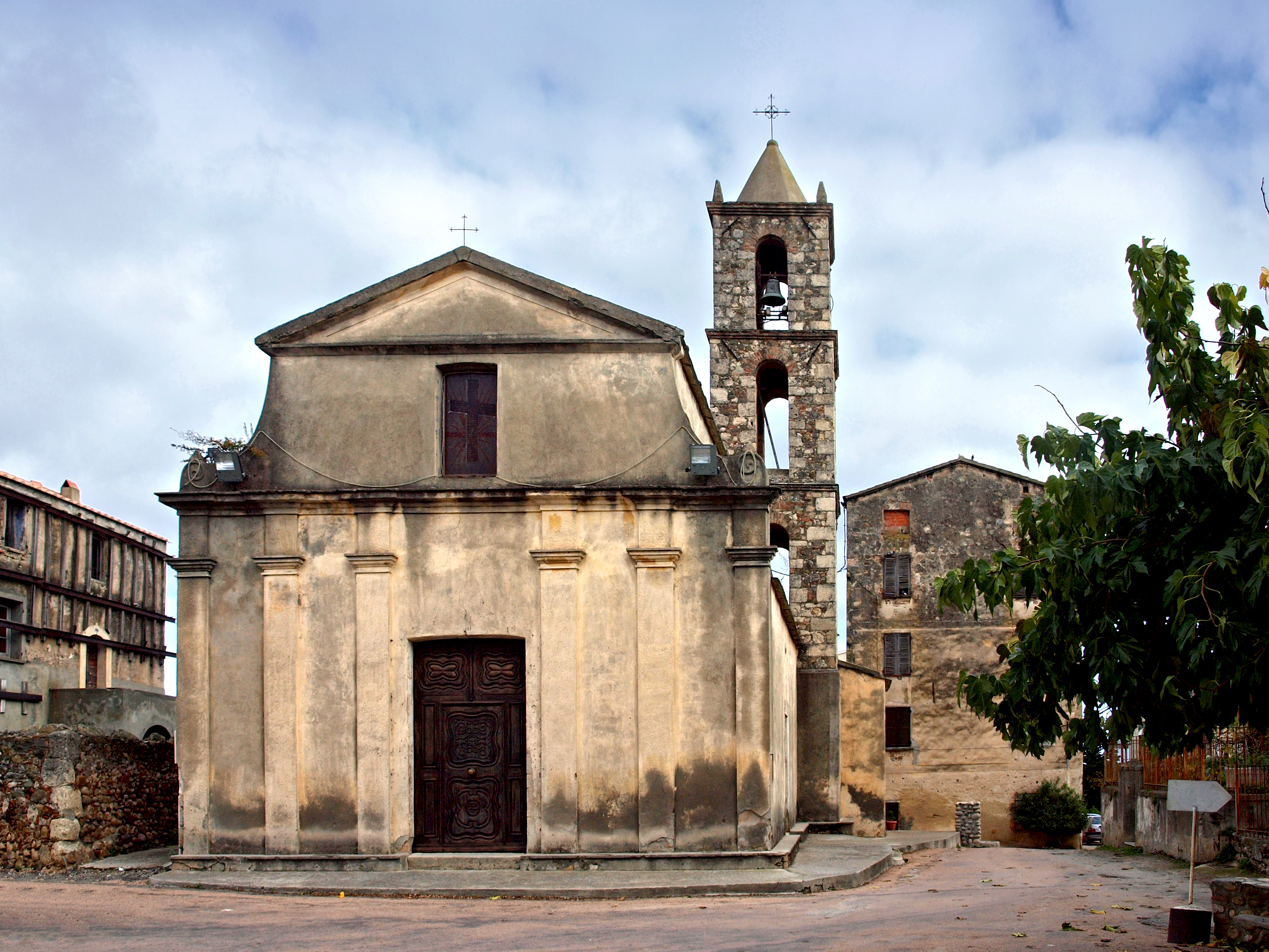 Aléria (Haute-Corse) - Église paroissiale Saint-Marcel